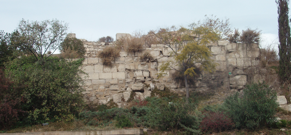 Ruinas de la Iglesia de San Pedro (Tudela), en 2010